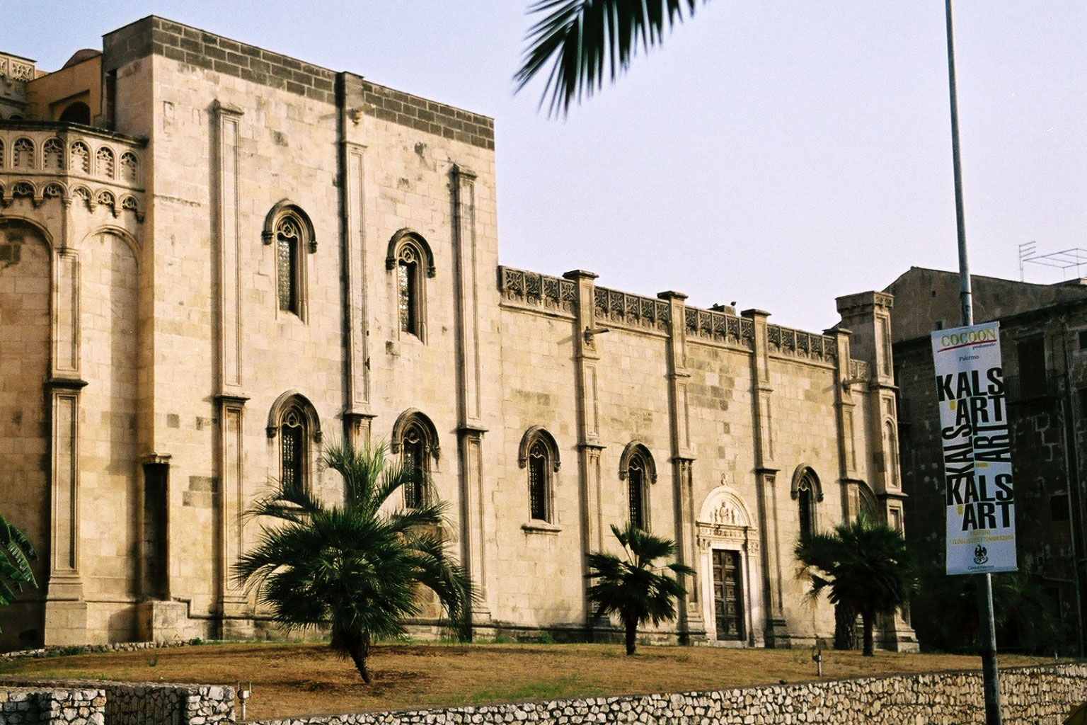 Santa Maria della Catena, Palermo Exterior side view